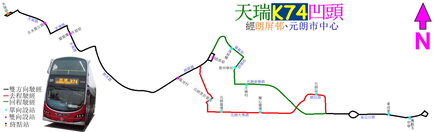 中文（香港）: 港鐵巴士K74線的地圖式路線圖